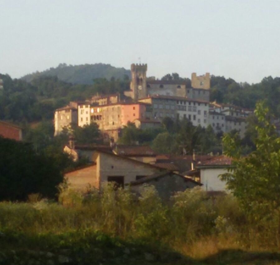 Borgo di Ghivizzano, 2015